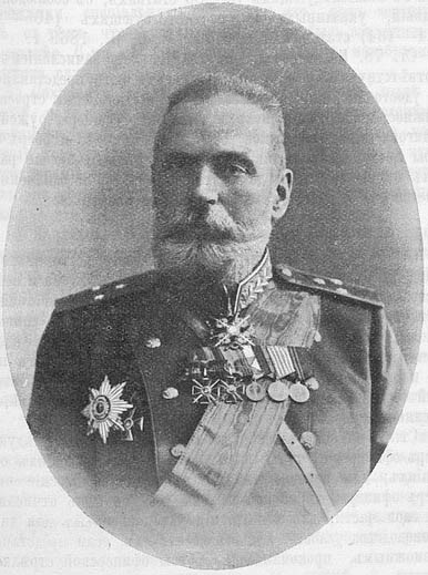 генерал Радкевич, Евгений Александрович